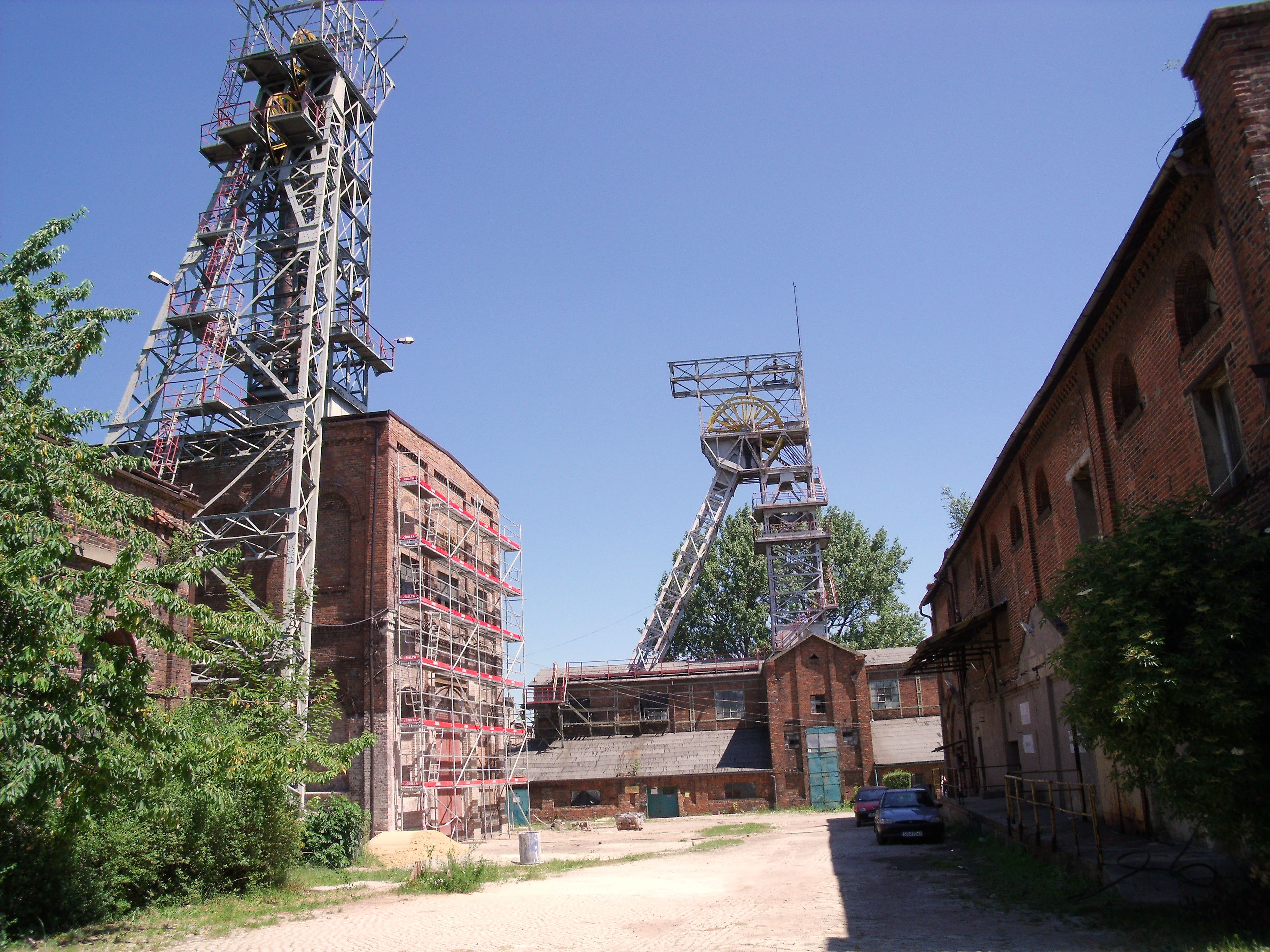 Hoym gruba. (zabytek nr rejestr. A/165/05)